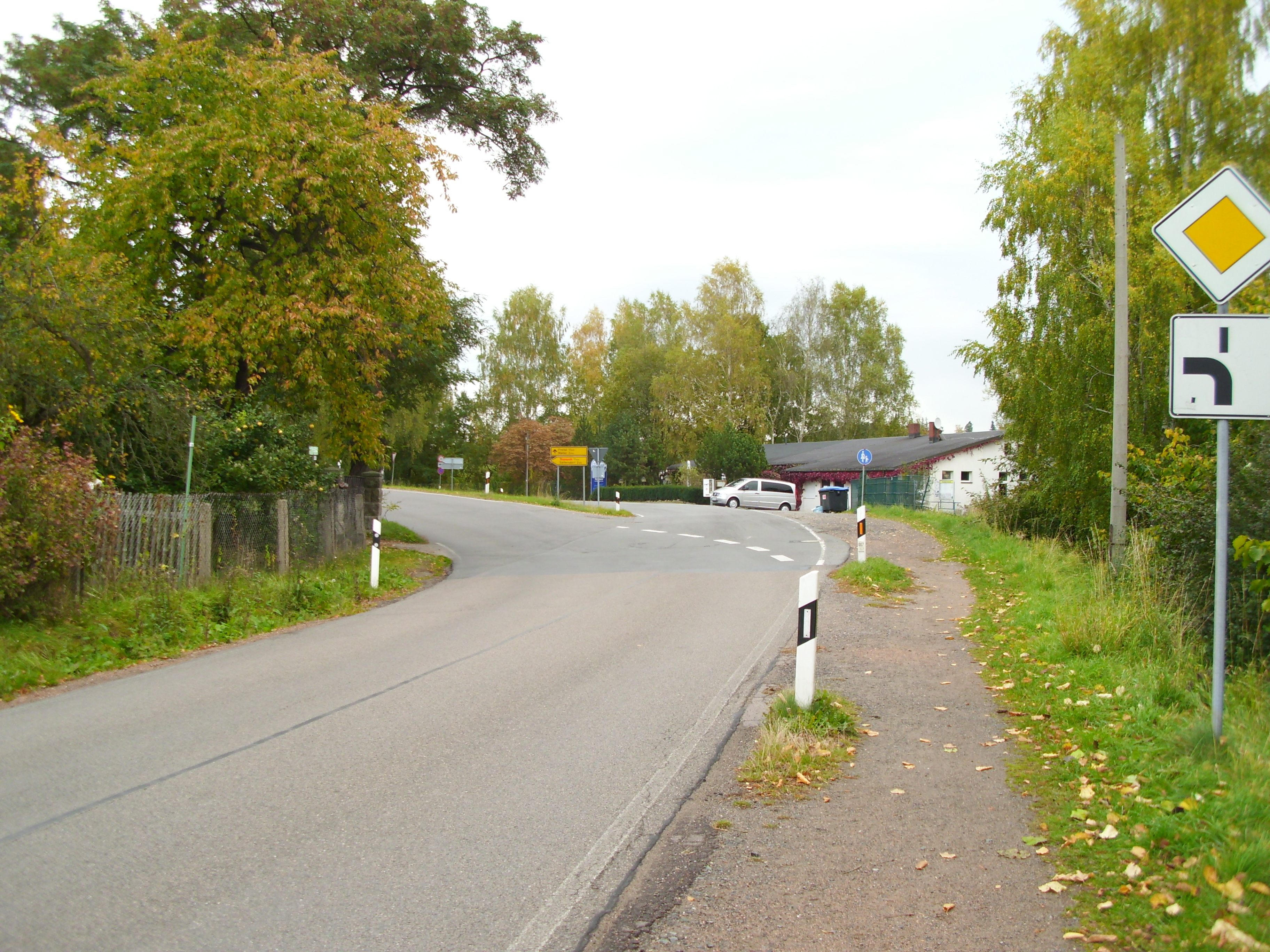 Das Seifersdorfer Bad liegt an der Talsperre Malter.